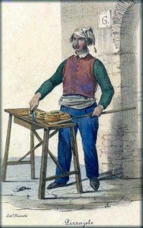 Pizzajolo in 1830 (litografia) : Civica Raccolta delle Stampe « Achille Bertarelli » - Milano , Italia.